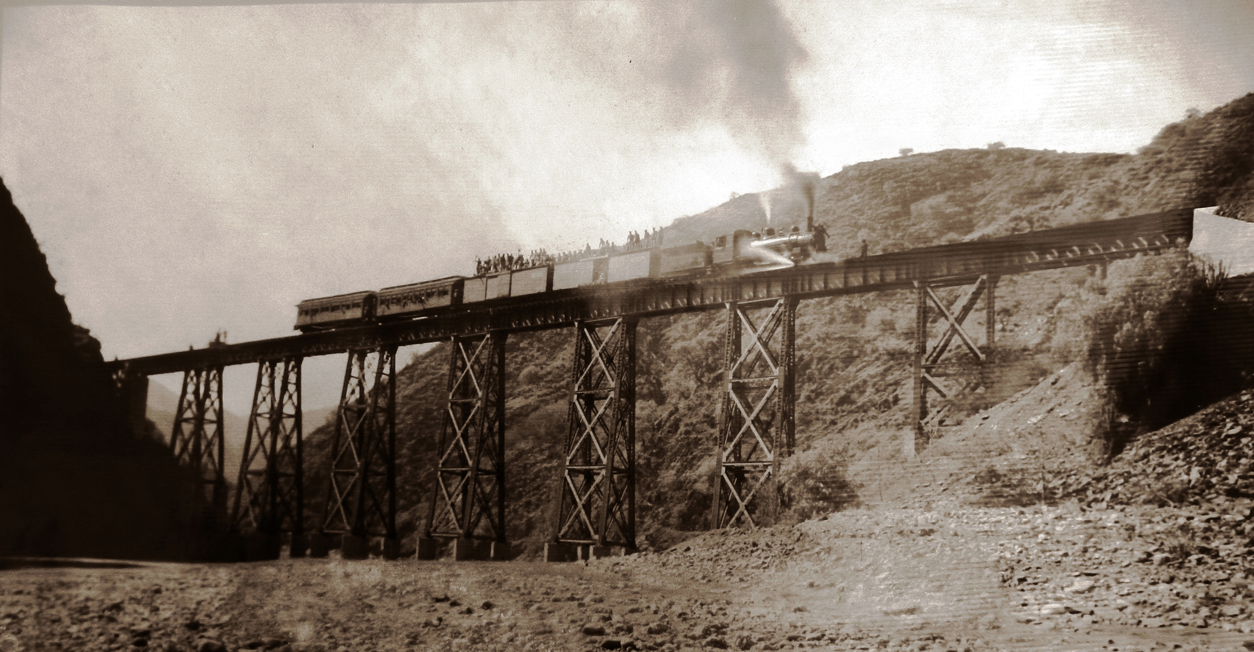 Puente de la linea ferrea Sucre Potosi,(Poblado Balneario de ÑUCCHU), en Bolivia. Exposisión en la Casa de la Libertad. Sucre. Bolivia. Visitada en noviembre del 2012